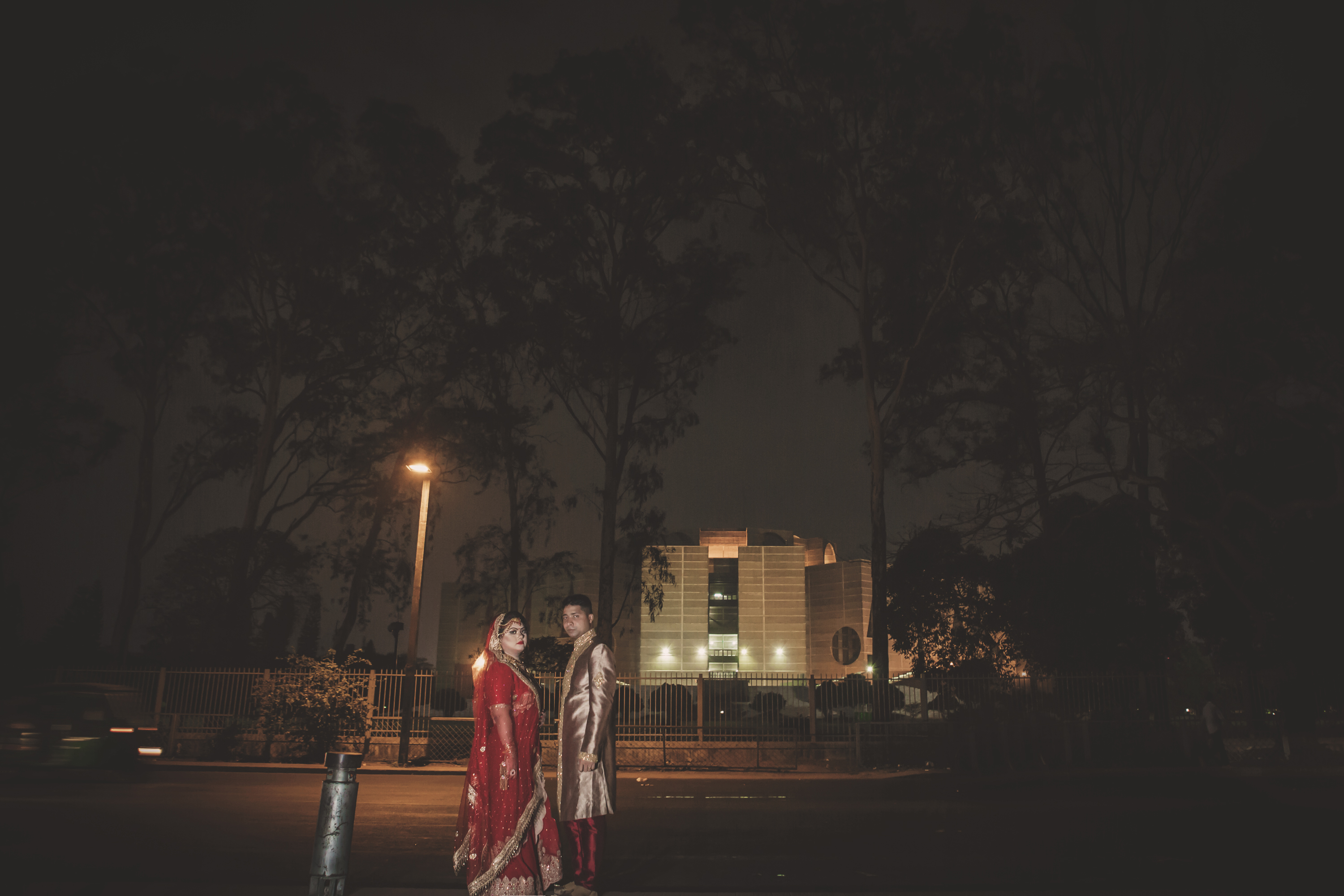 জাতীয় সংসদ ভবন